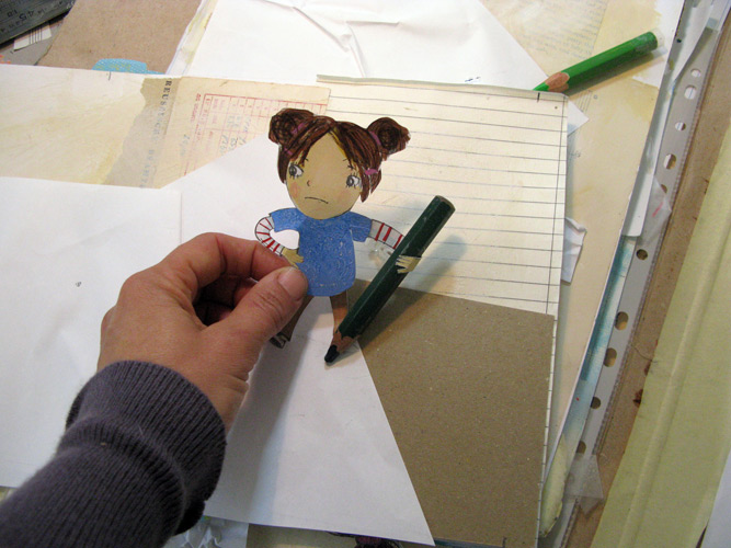 פרט שנוצר לצורך איור הספר ״בדיוק כמו שרציתי״ שכתבו אלינוער קלר ונעמה פלג, יצא בכנרת זמורה ביתן ב 2013, איור מצולם של איה גורדון-נוי